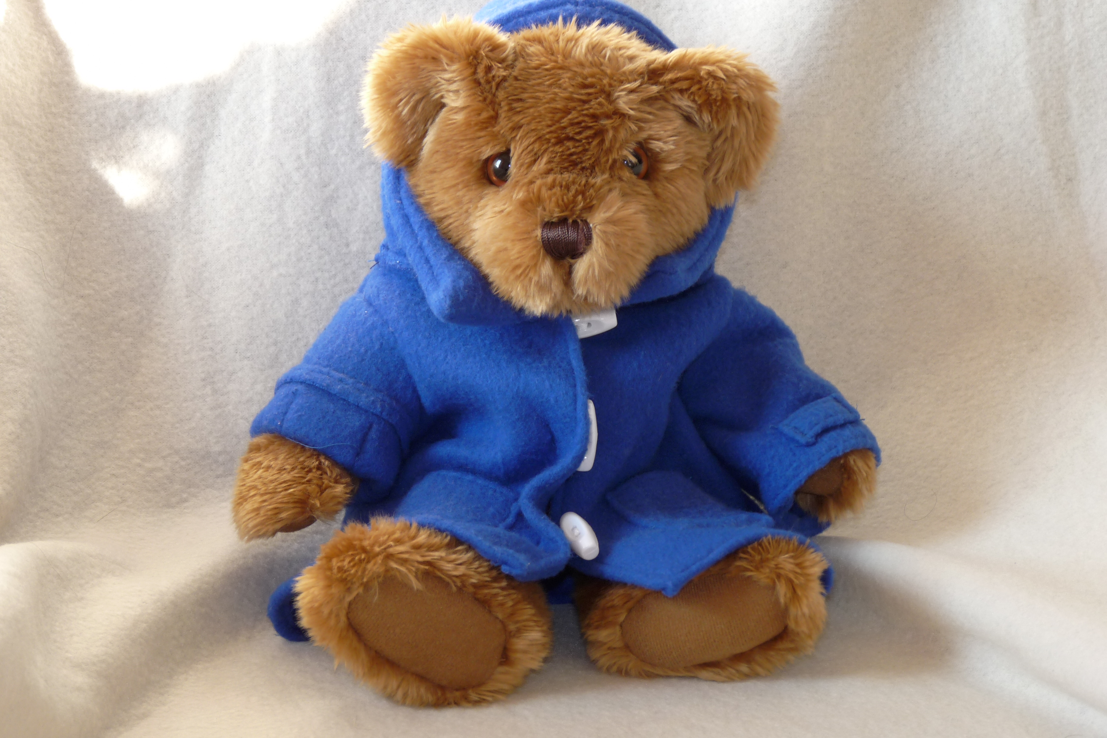 Teddy mit Namen Biberbaer